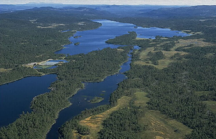 Lillsjön i bildens vänstra nederdel. Motiv: Östersjön Nyckelord: Flygbilder, Riksintressen Kategori: InsjömiljöerLillsjön i bildens vänstra nederdel.